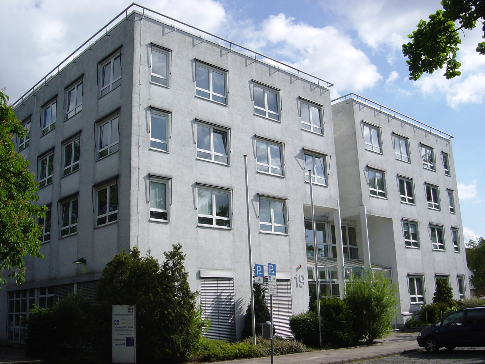 Ehemaliger Sitz des Verwaltungsgerichts Hannover, Eintrachtweg 19, 30173 Hannover